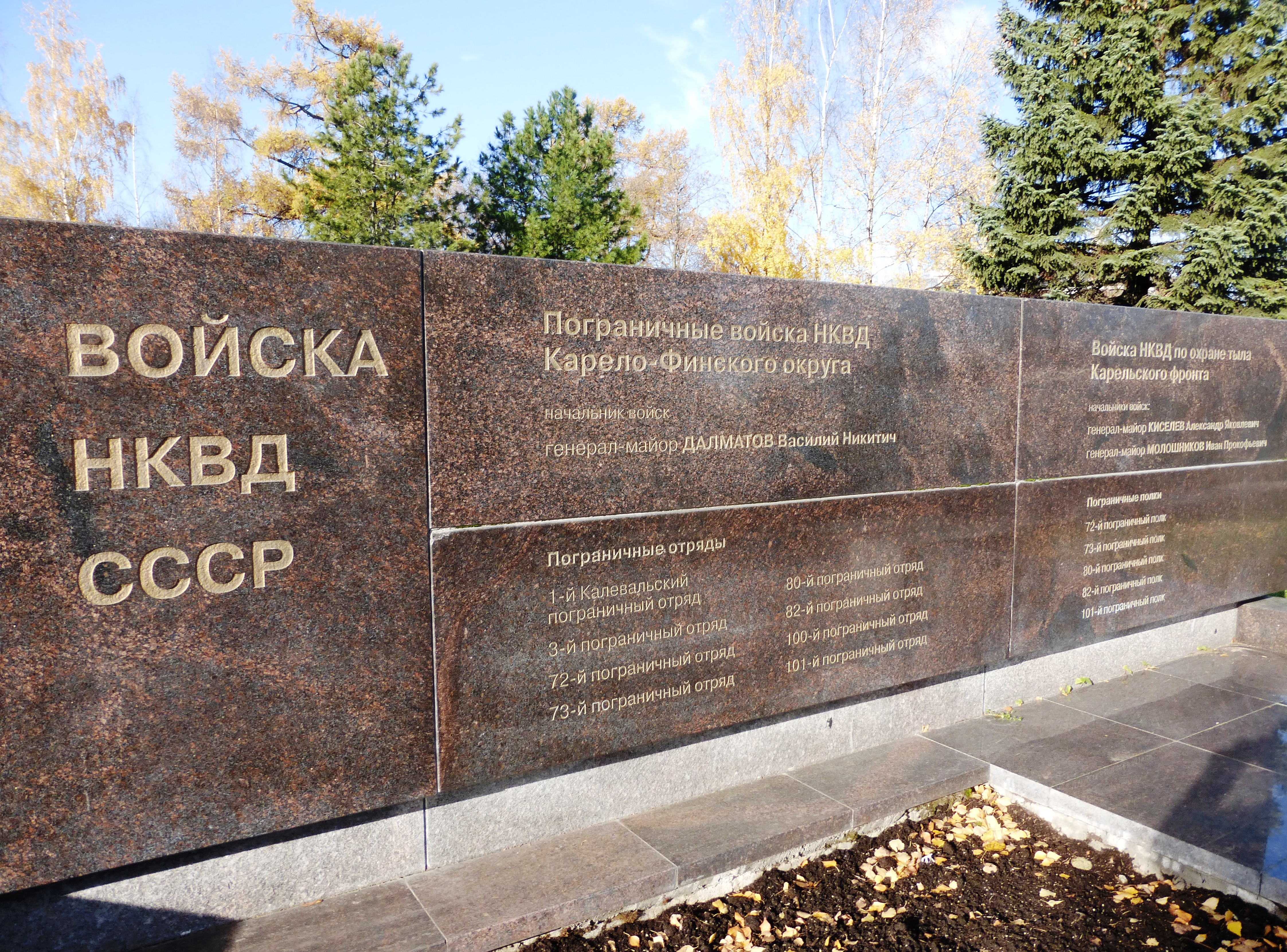 Фрагмент военно-мемориального комплекса Карельского фронта «Аллея памяти и славы» в Петрозаводске